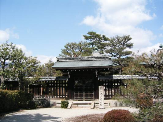 Emperor Kameyama(亀山天皇)'s Imperaial Mausoleum (misasagi at Kyoto from Wikipedia -- この写真は2004年(平成16年)3月26日に投稿者が撮影したものです。